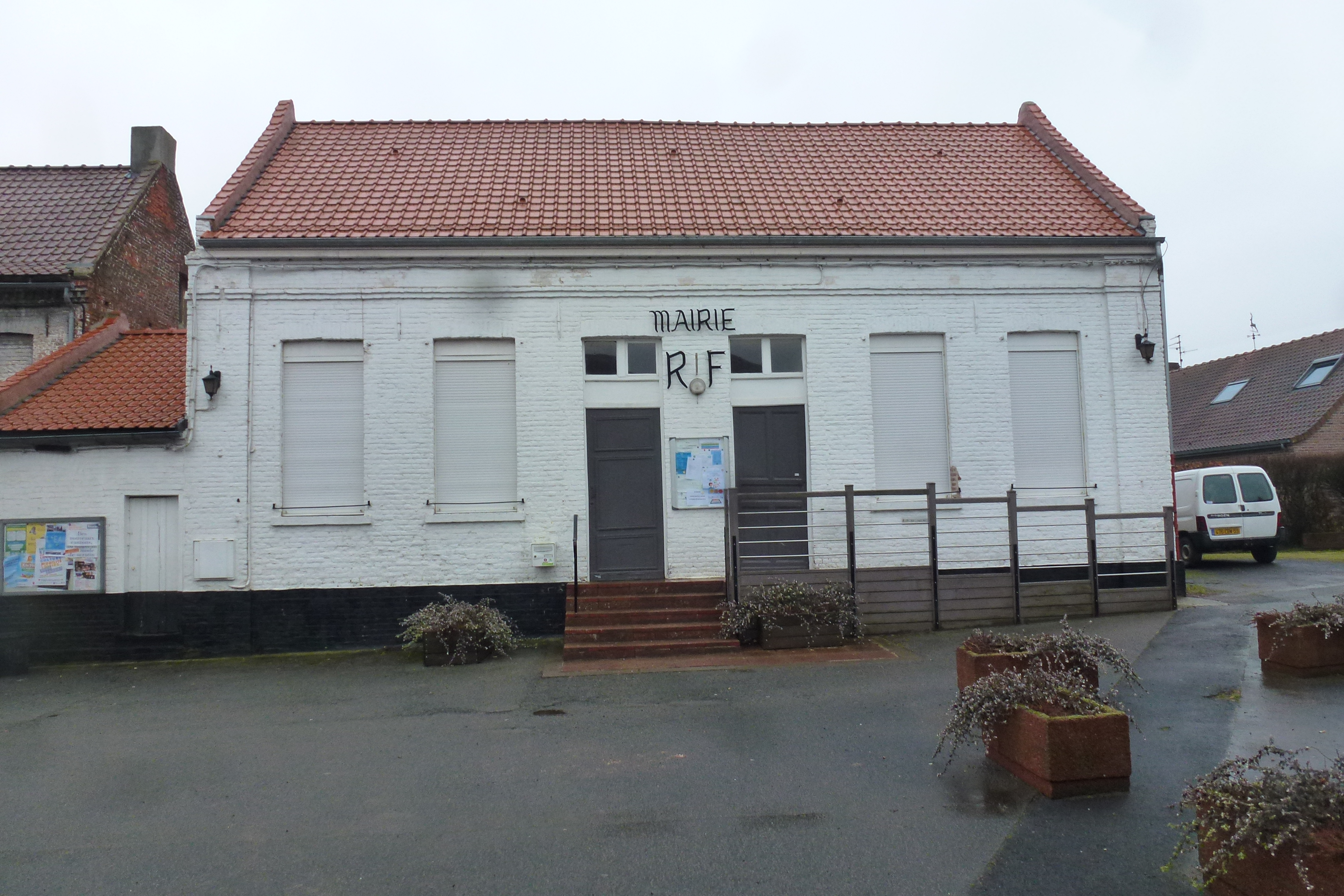 la mairie de Cobrieux Nord).-France